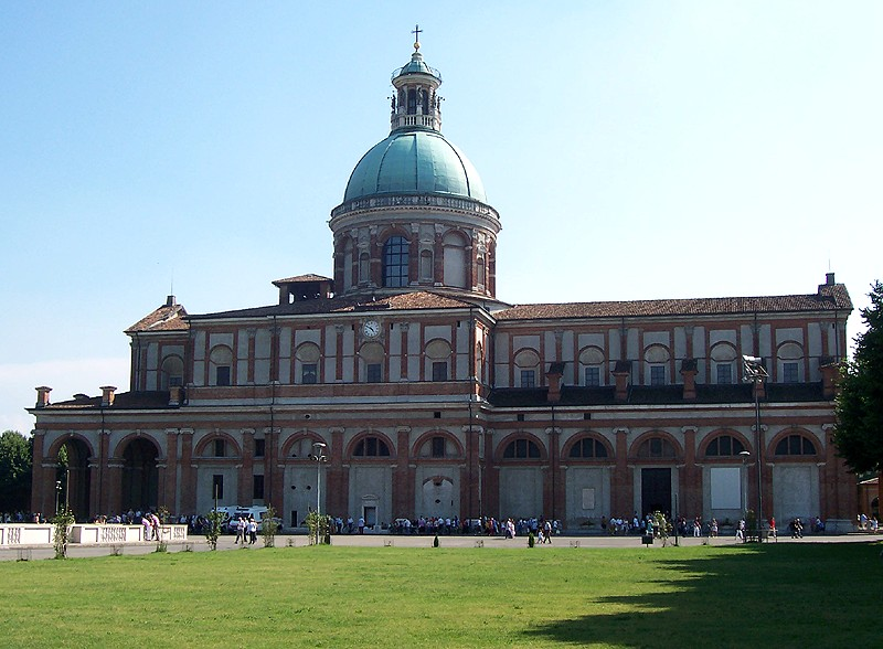 Caravaggio - Santuario della Madonna del Fonte